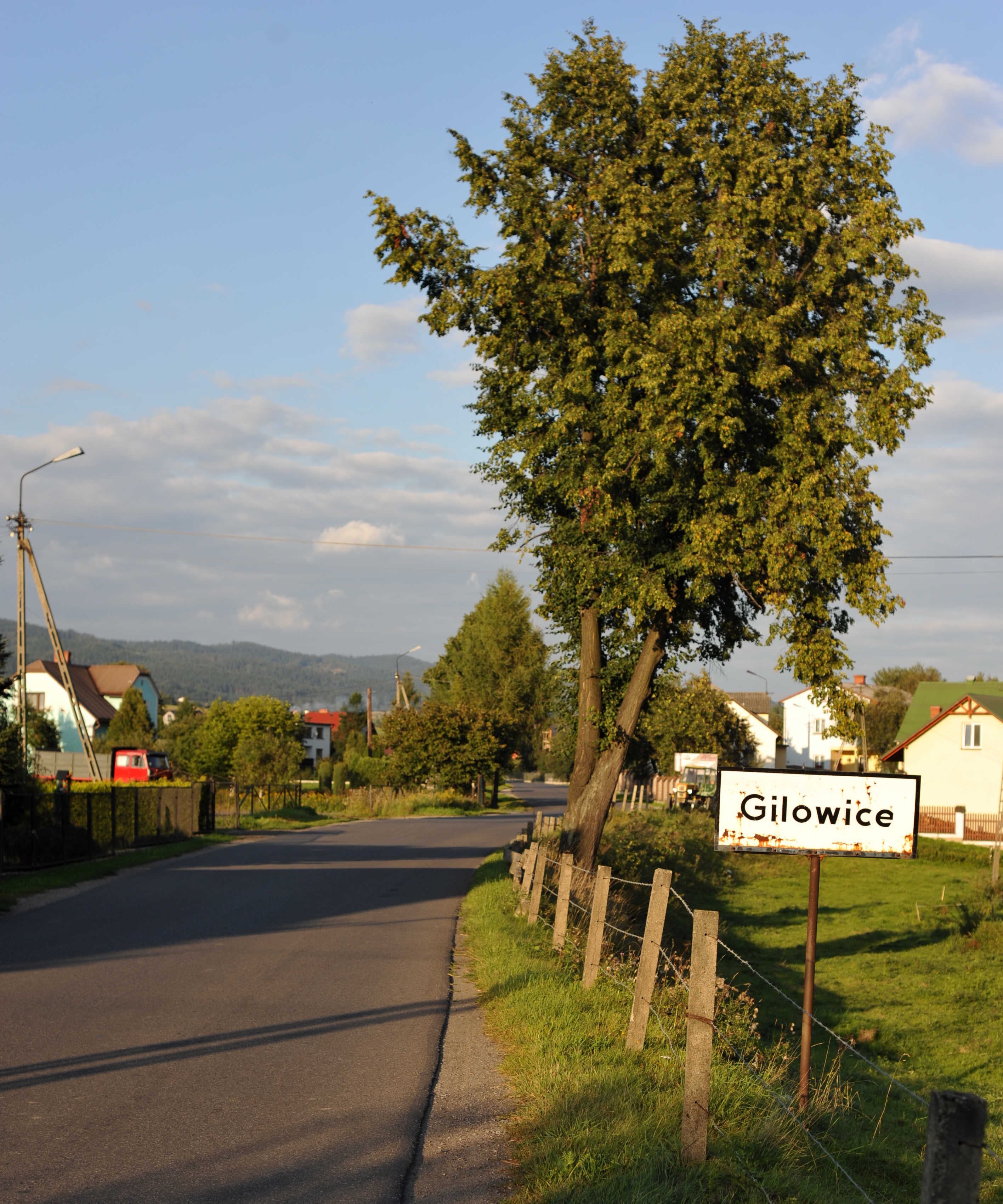 Gilowice w powiecie Żywieckim